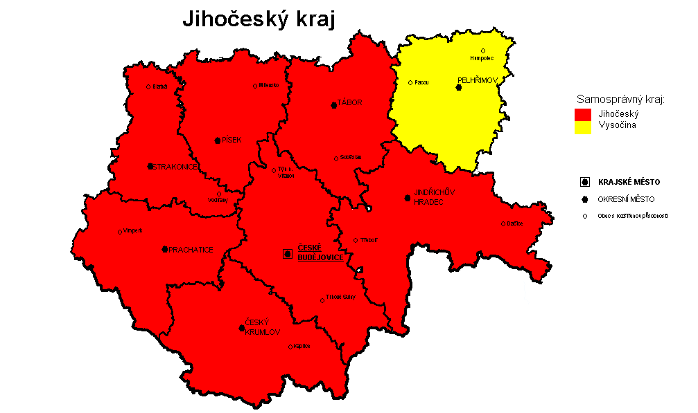 Mapa Jihočeského kraje (1960-1990), využita mapy NUTS z české wikipedie, upraveno v grafickém editoru